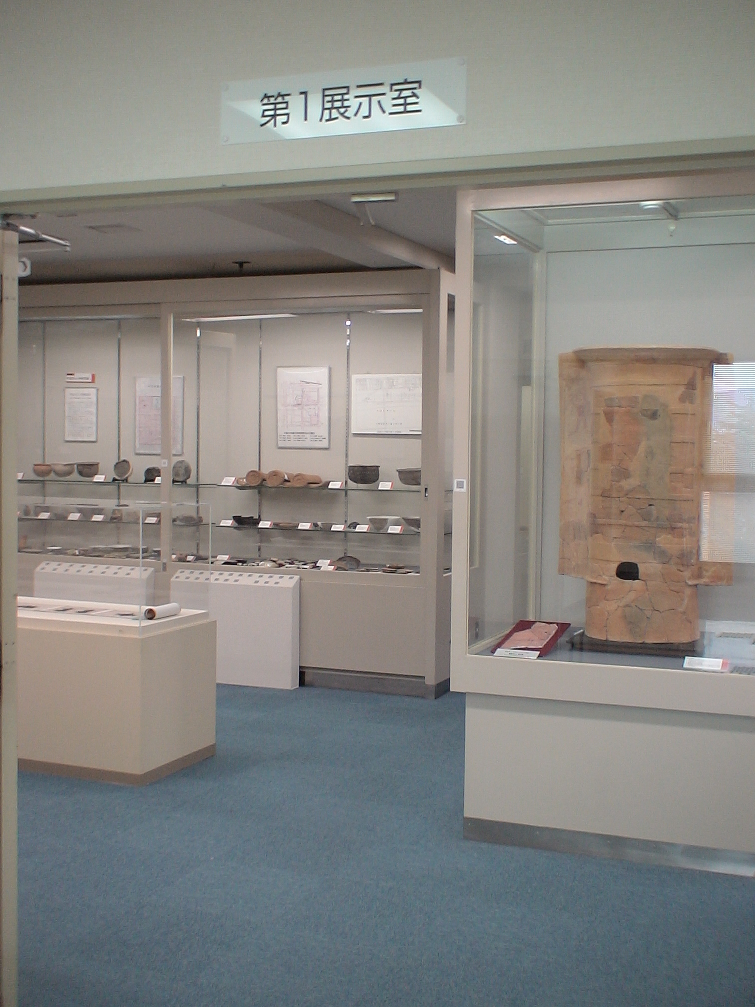 花園大学歴史博物館第1展示室